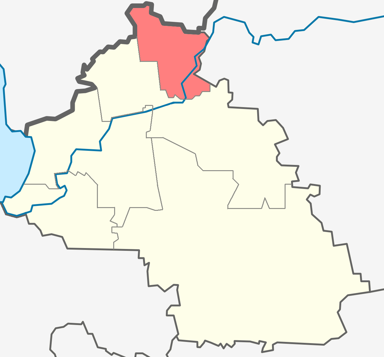 Свирьстройское ГП на карте Лодейнопольского района